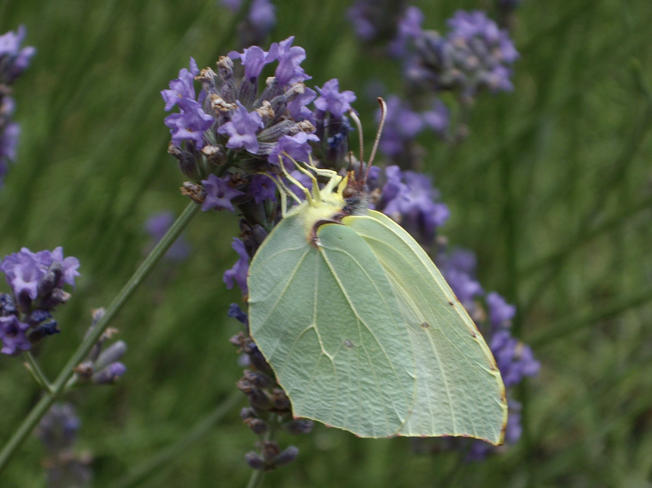 Kleopatra-Falter